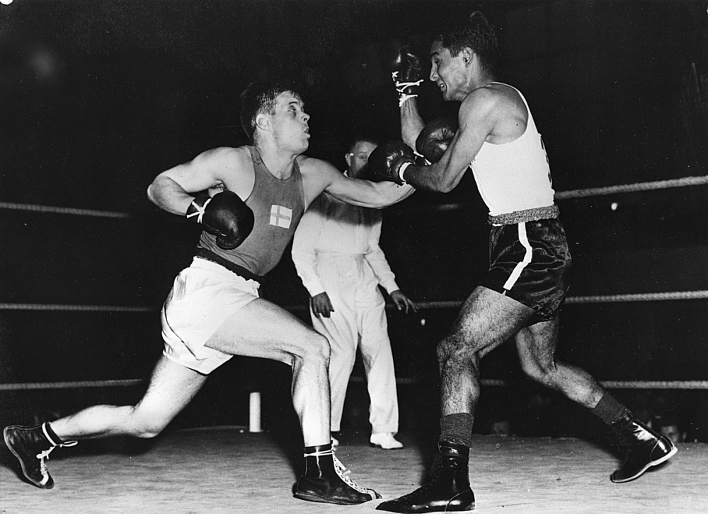 Pentti Hämäläinen (left)